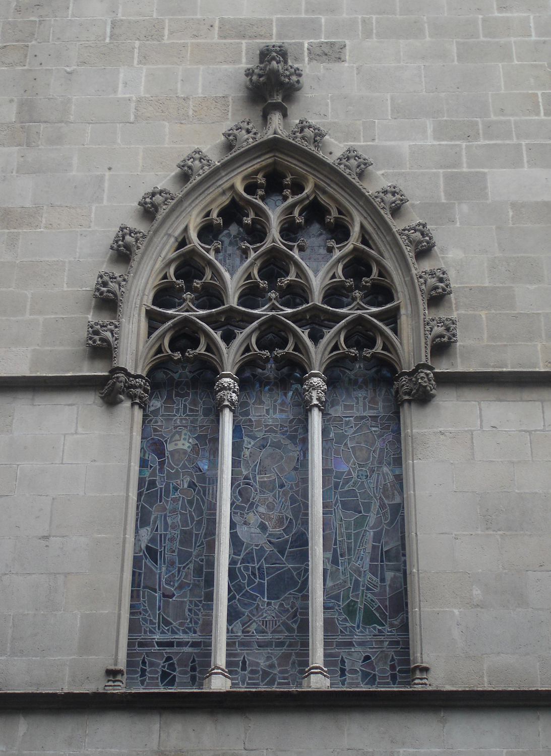 Façana antiga de l'ajuntament de Barcelona (Catalunya, Espanya)